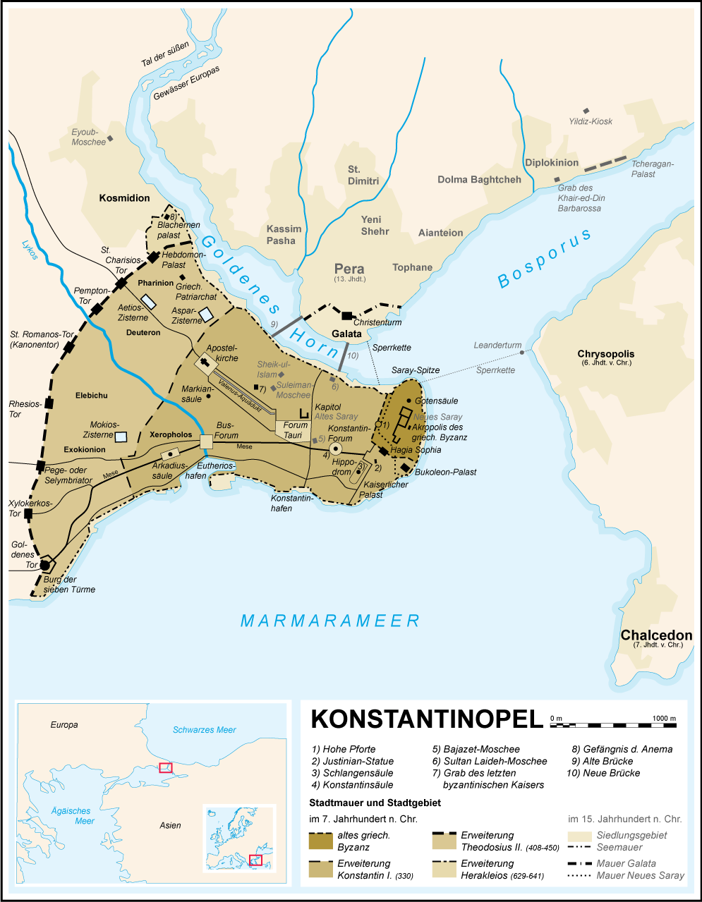 de: Karte des spätantiken und mittelalterlichen Konstantinopels